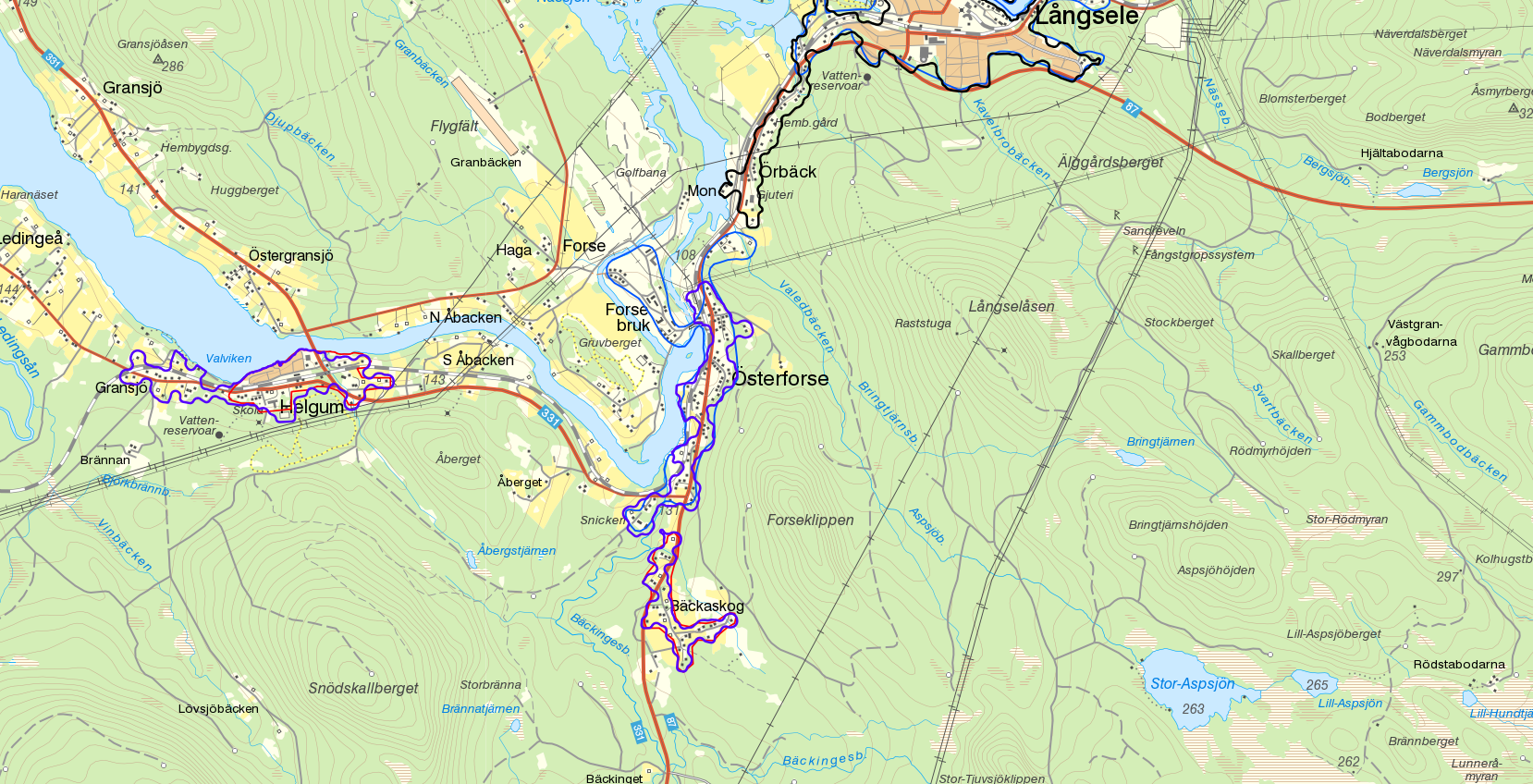 Tätorterna Österforse samt en del av Långsele med gränserna från Statistiska centralbyråns tätortsavgränsning 2010 i blått och 2015 i svart. Småortsgränser från 2010 i rött och 2015 i lila. Bakgrundskarta från Lantmäteriet, skala 1:30 236.